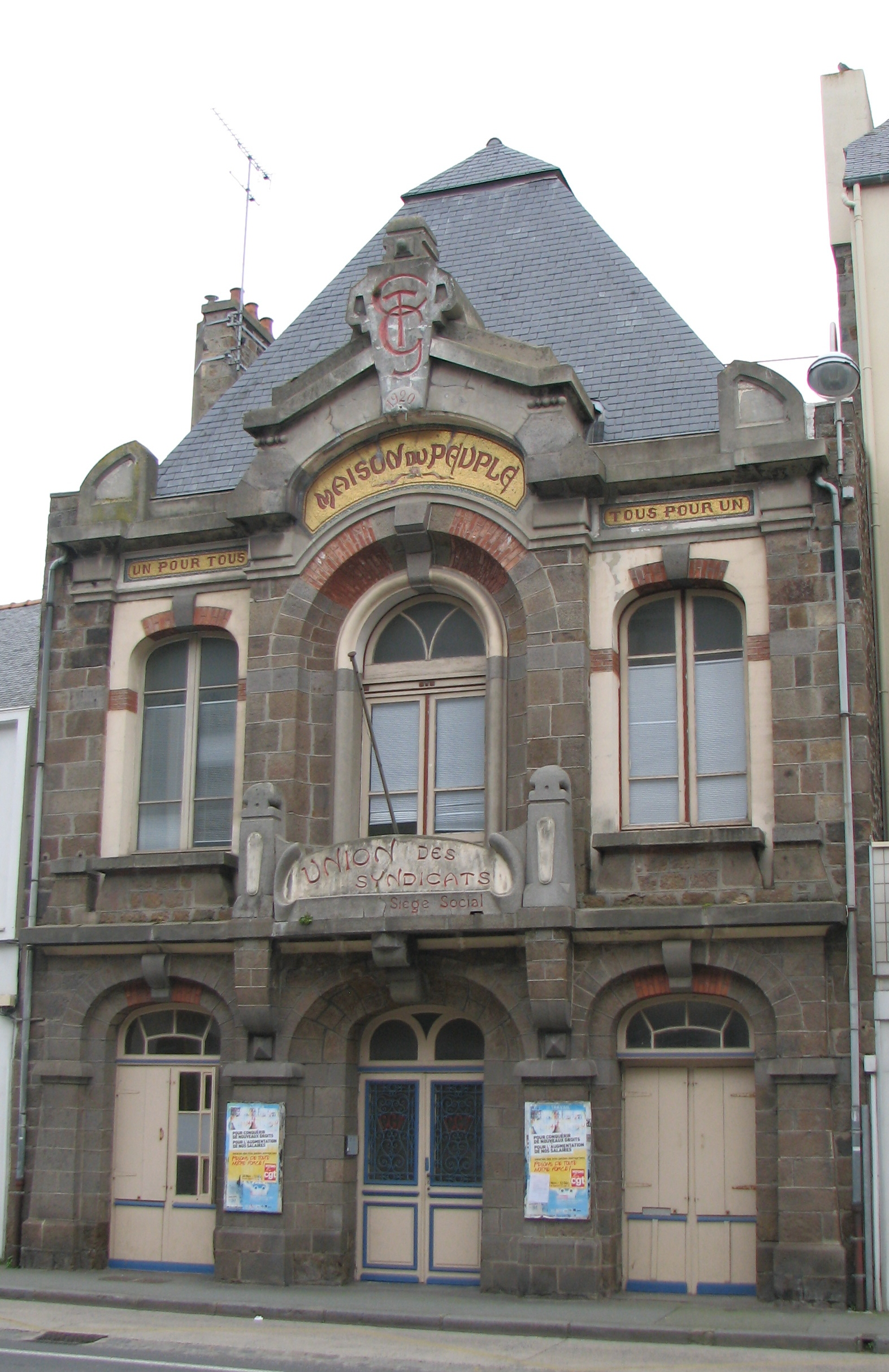 Maison du Peuple de Saint-Malo au 13 avenue Jean-Jaurès.